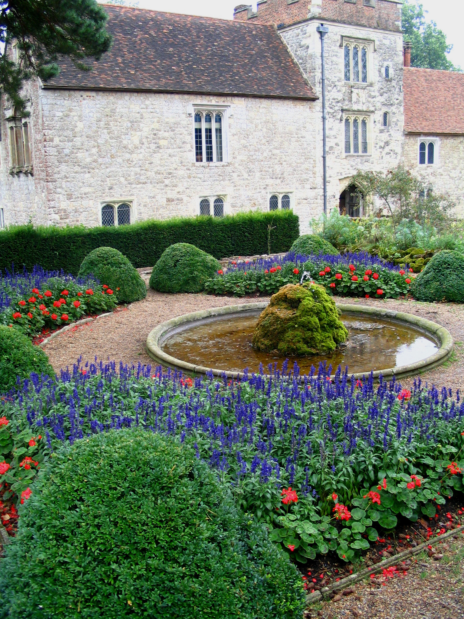 Manoir médiéval de Ightham mote - Angleterre Propriété du National Trust Auteur: P.Charpiat - 2006